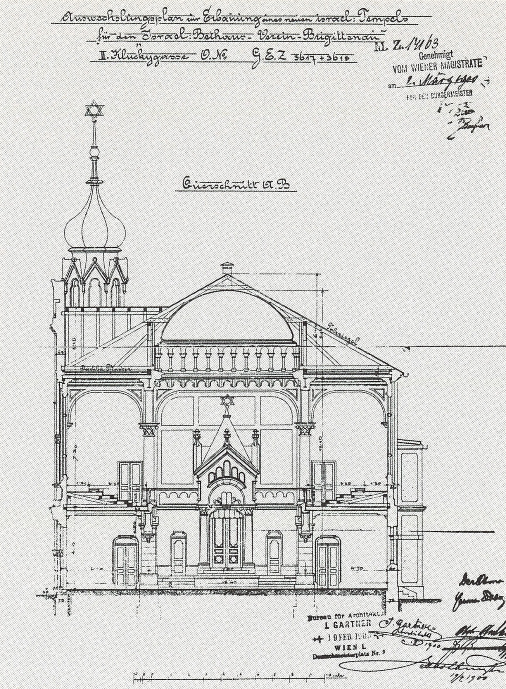 Die Synagoge in der Kluckygasse, Querschnitt, Baupläne von Jakob Gartner.